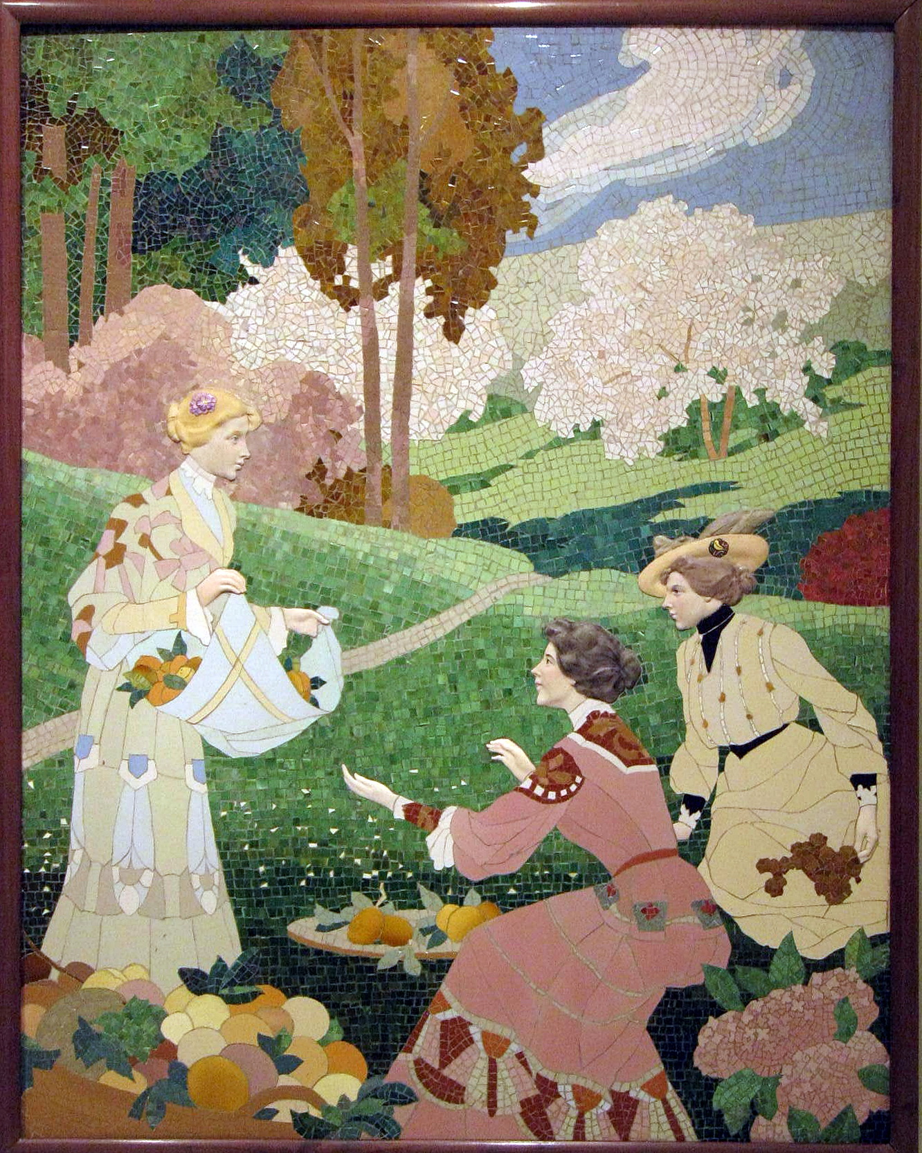 Palau Nacional (Barcelona)